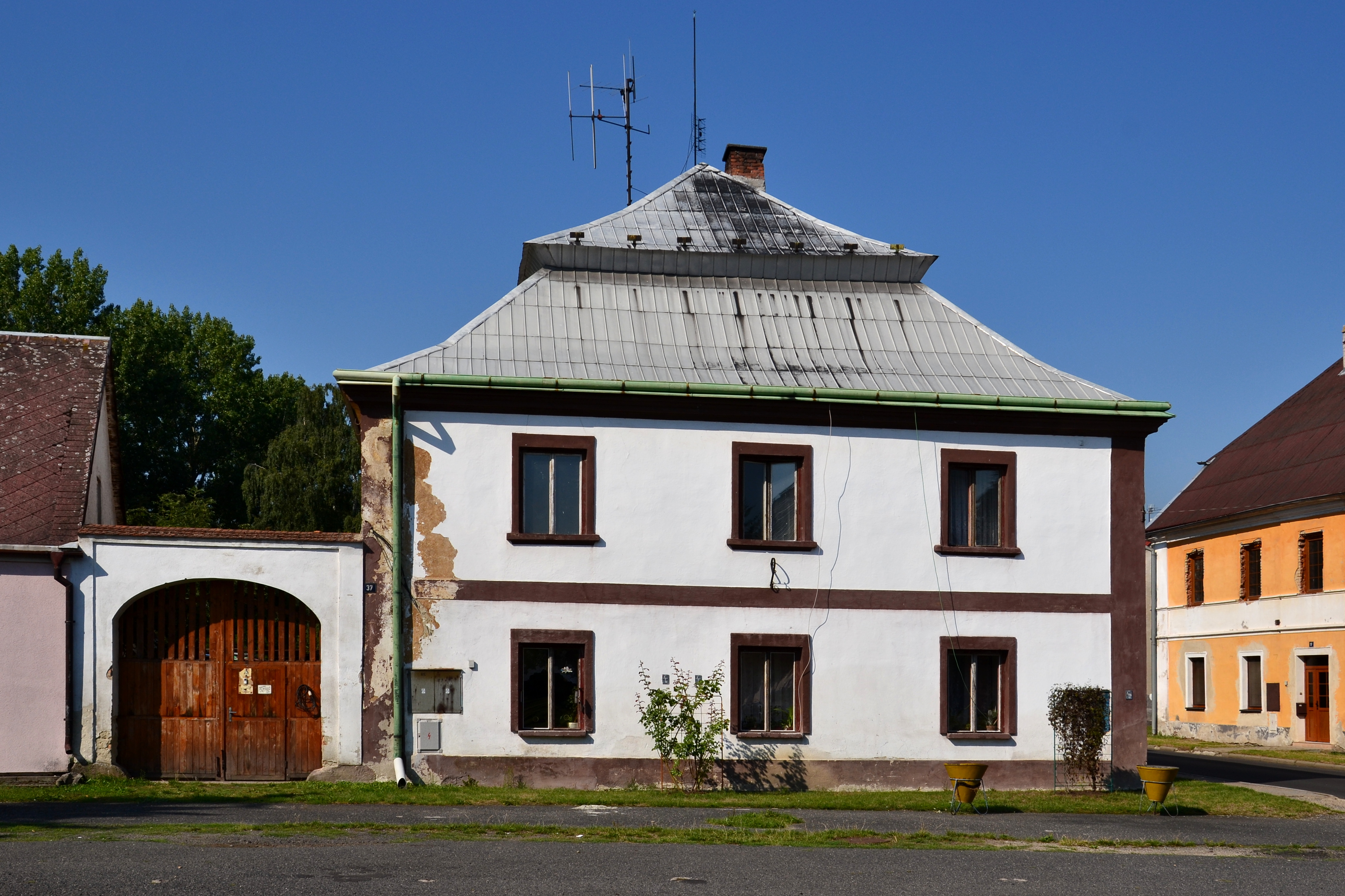 Usedlost čp. 37, Vilémov 37, Vilémov (okres Chomutov).